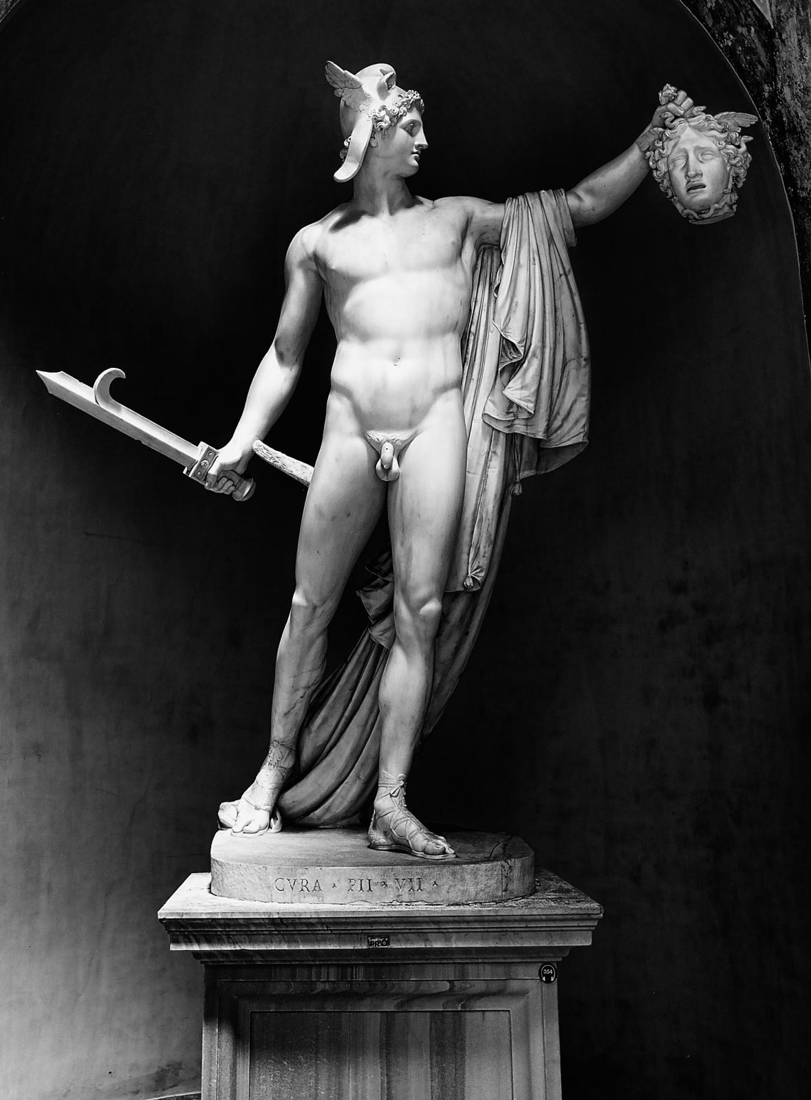 rome